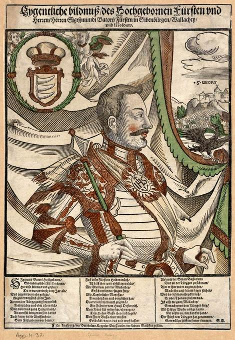 Báthory Zsigmond Erdély fejedelme